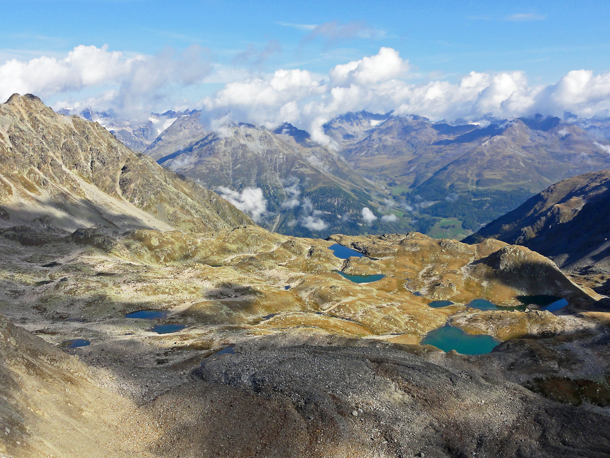 Lais da Macun, von Süden